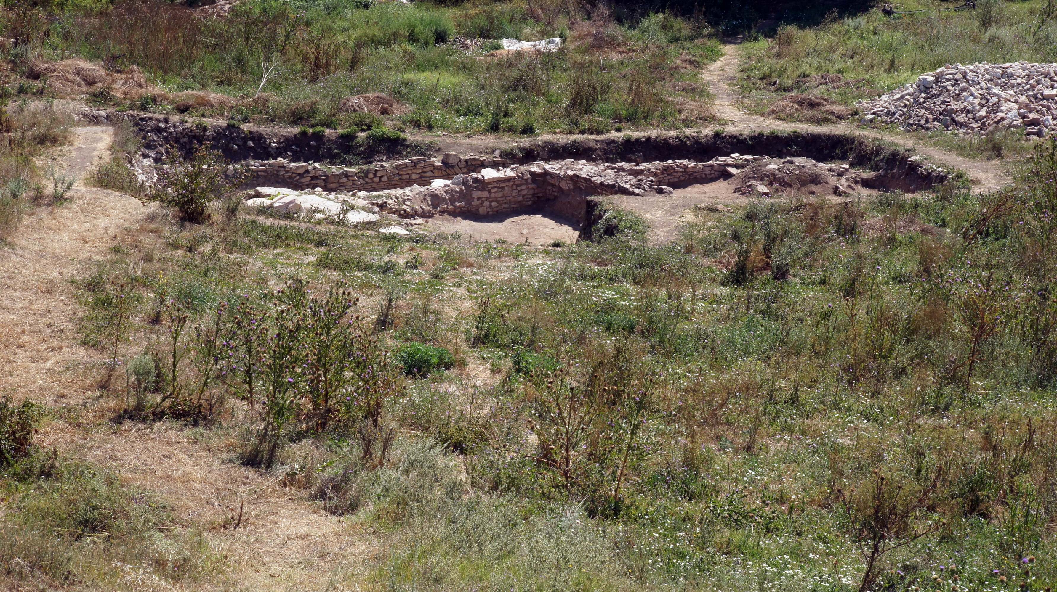 Cetatea Ibida